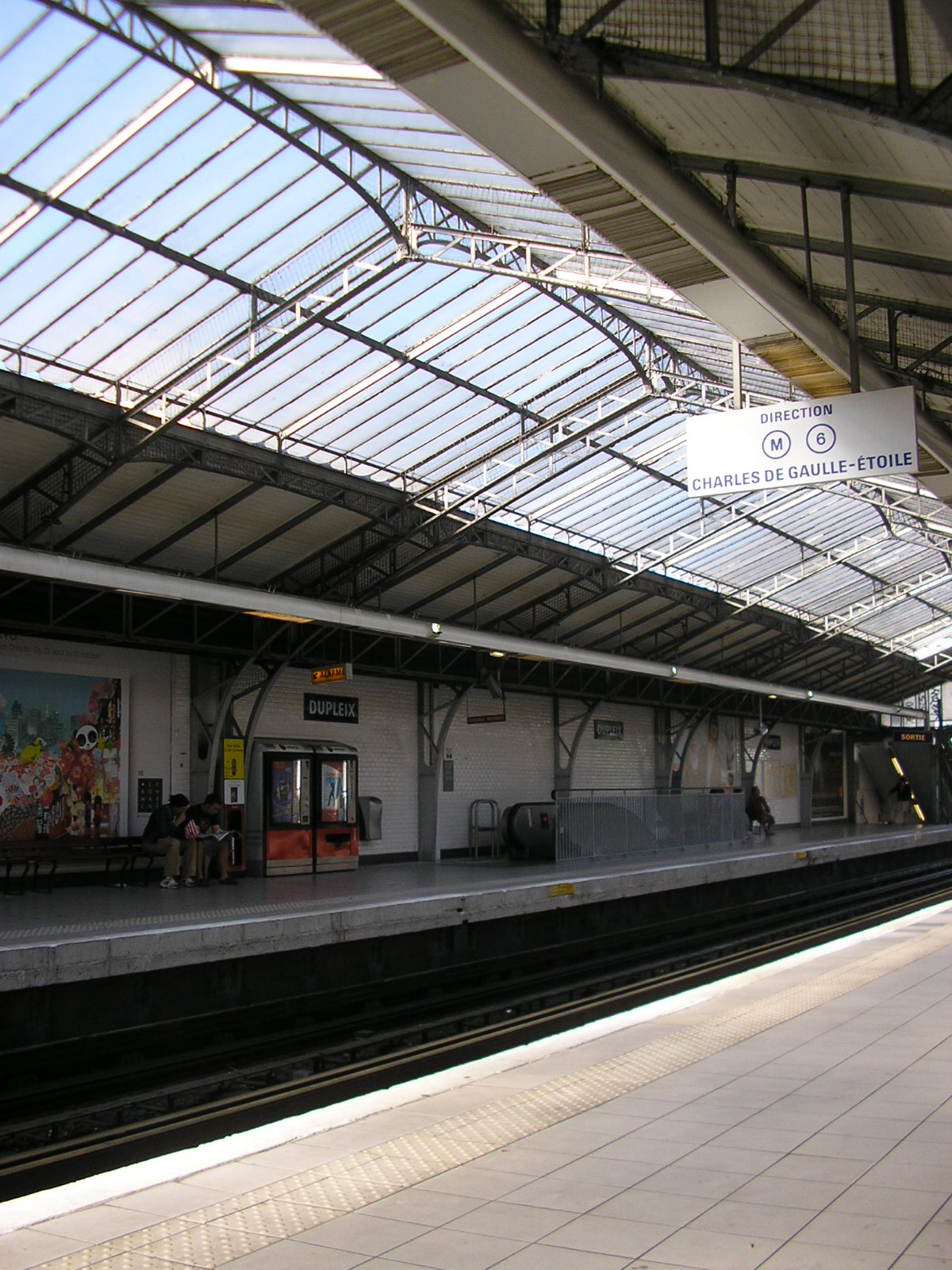 Métro aérien